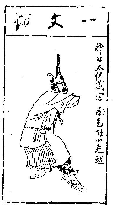 戴宗。